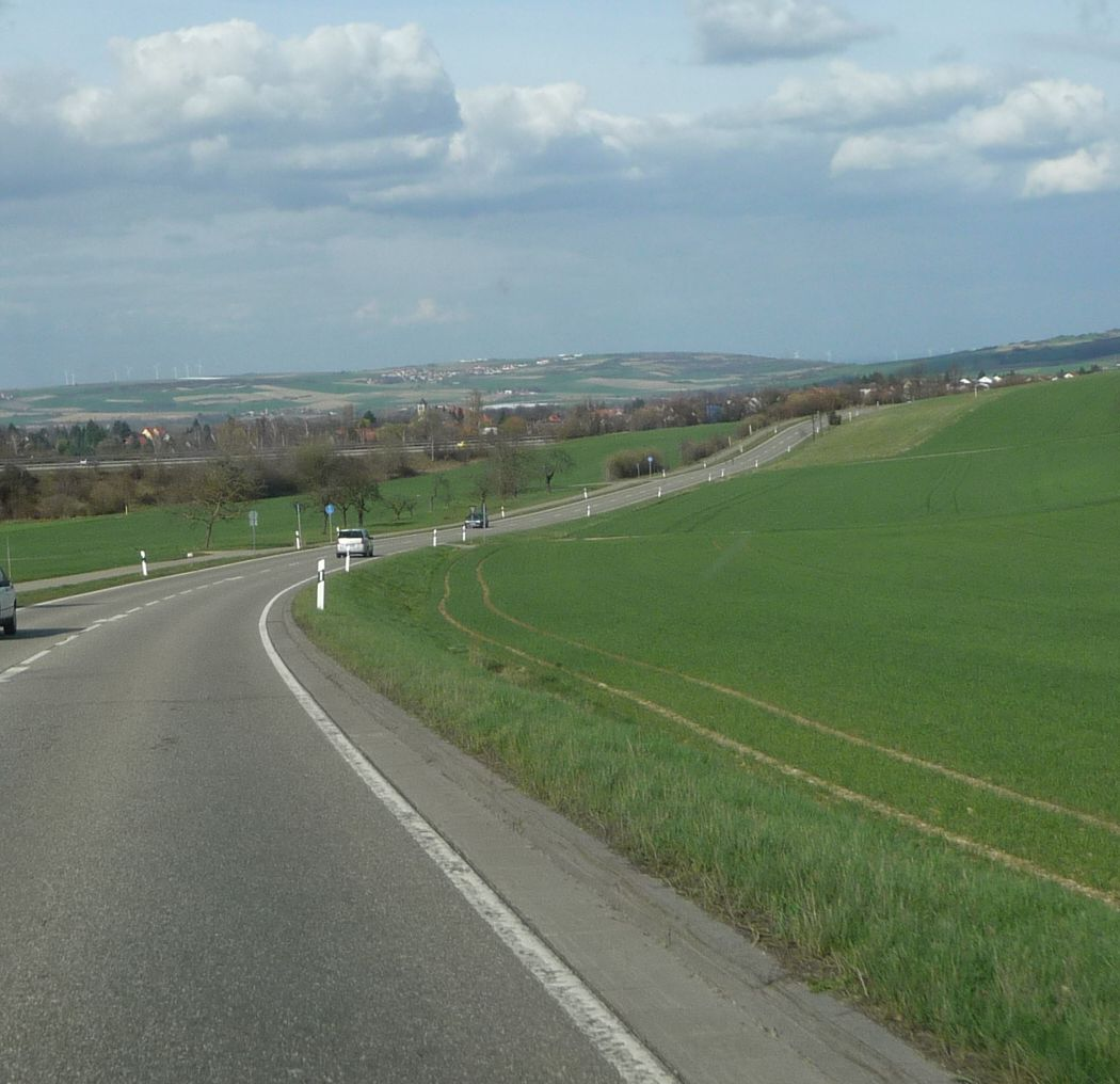 Wattenheim